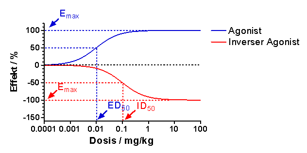 Konzentrations-Wirkungskurve für einen vollen Agonisten und einen vollen inversen Agonisten